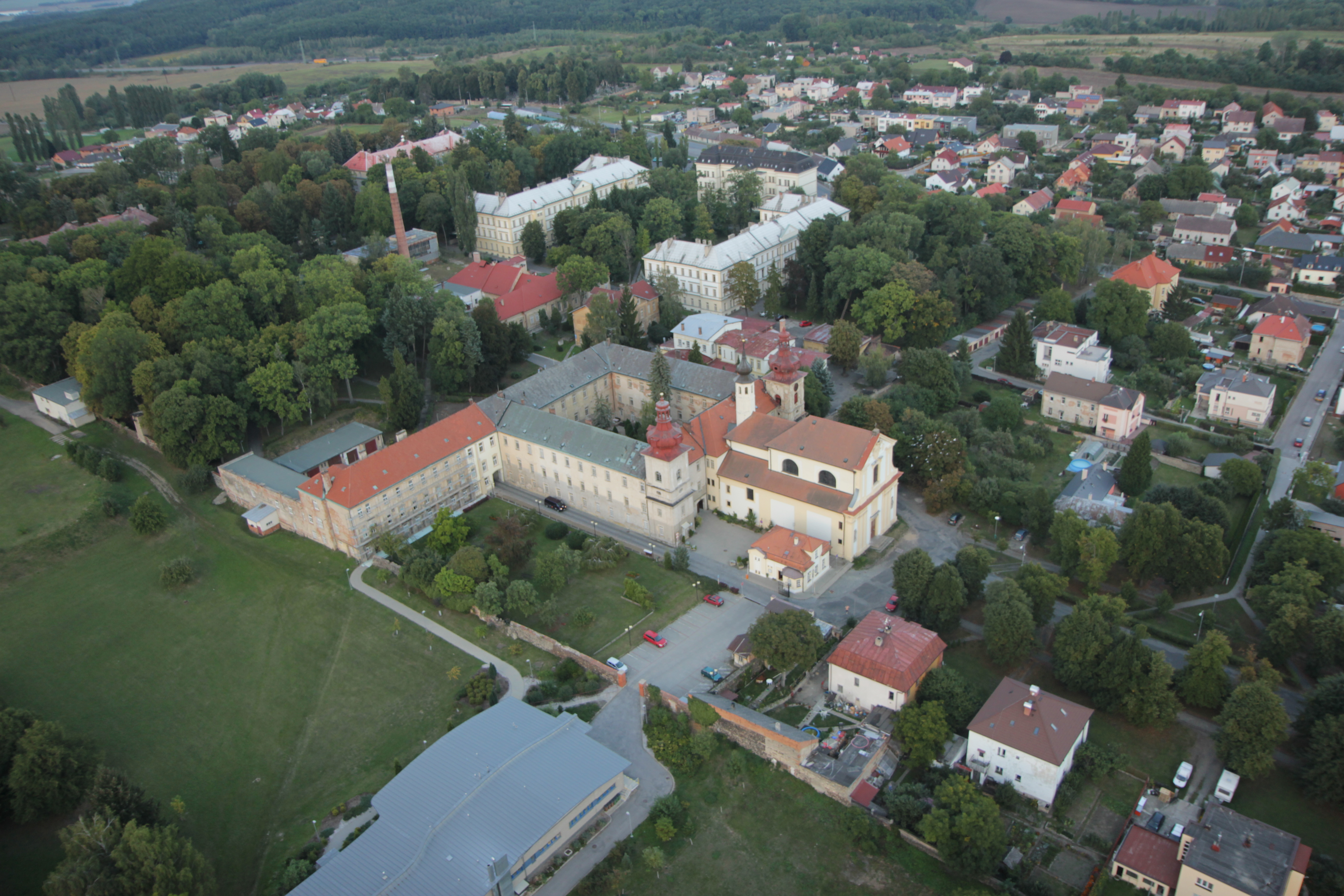 Klášter piaristický (Kosmonosy), Lípy 15, Kosmonosy